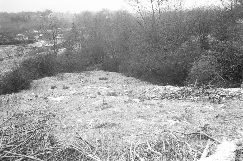 in Verlängerung der Lütjenburger Straße.